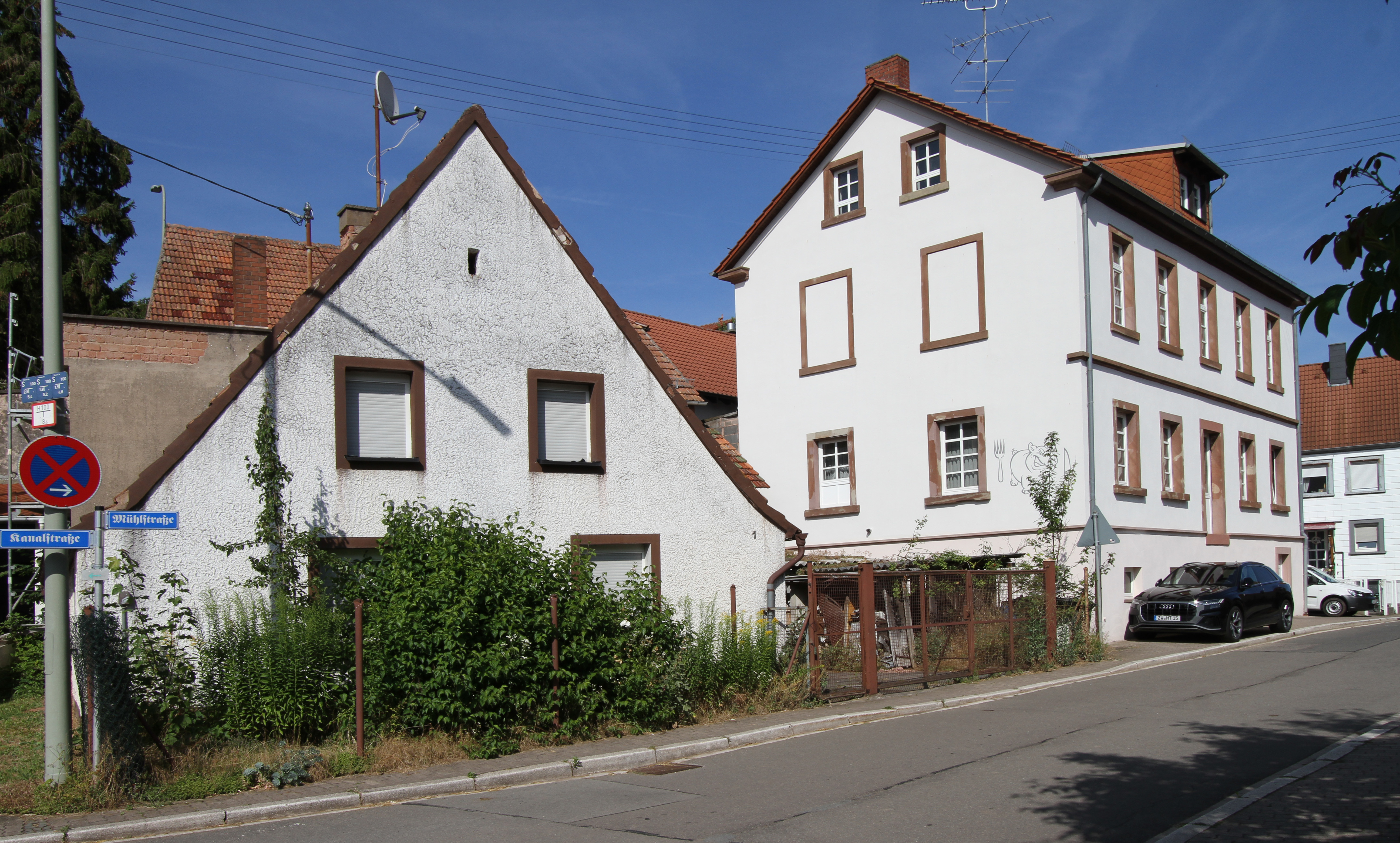 Walshausen